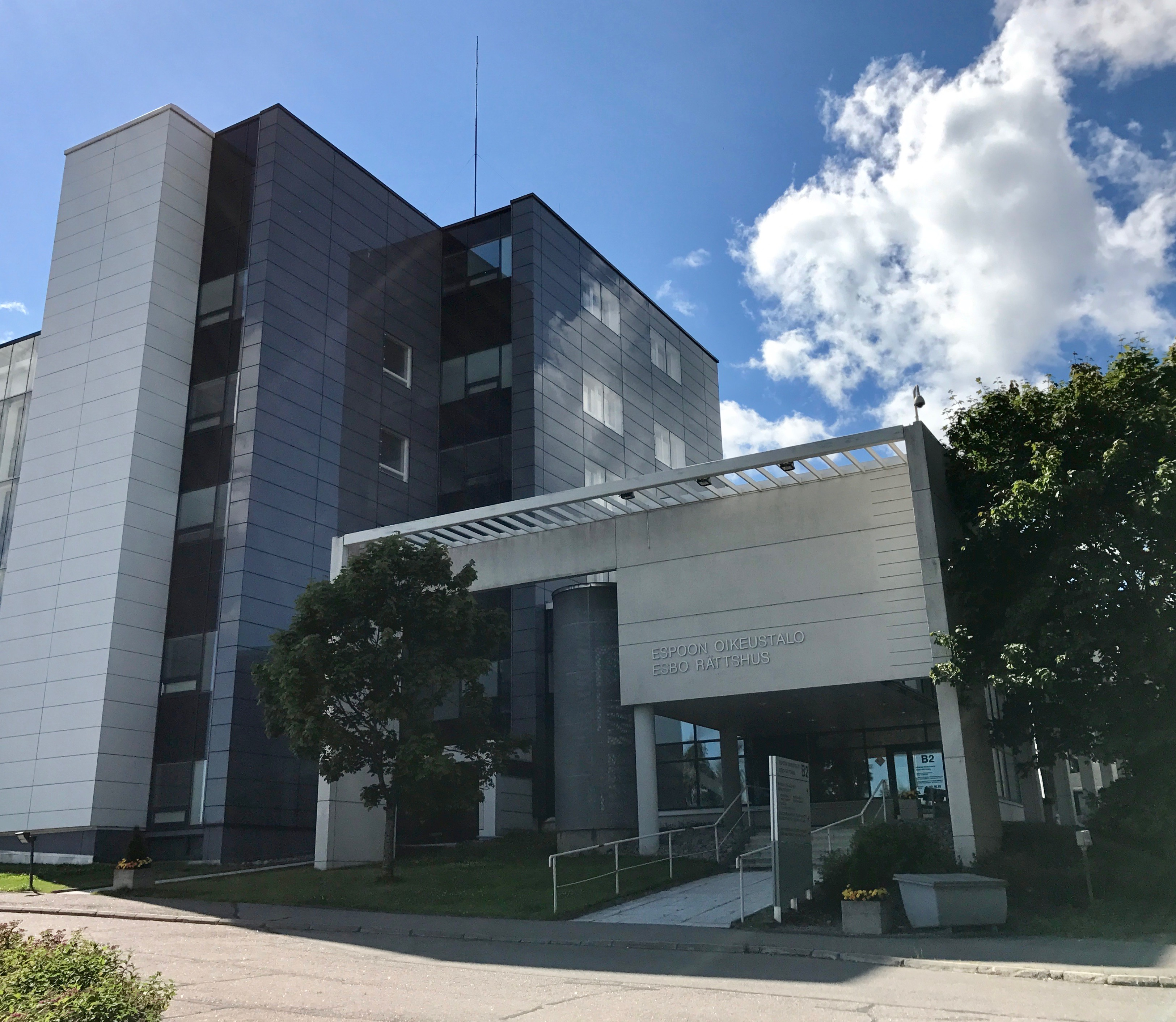 Espoon käräjäoikeus